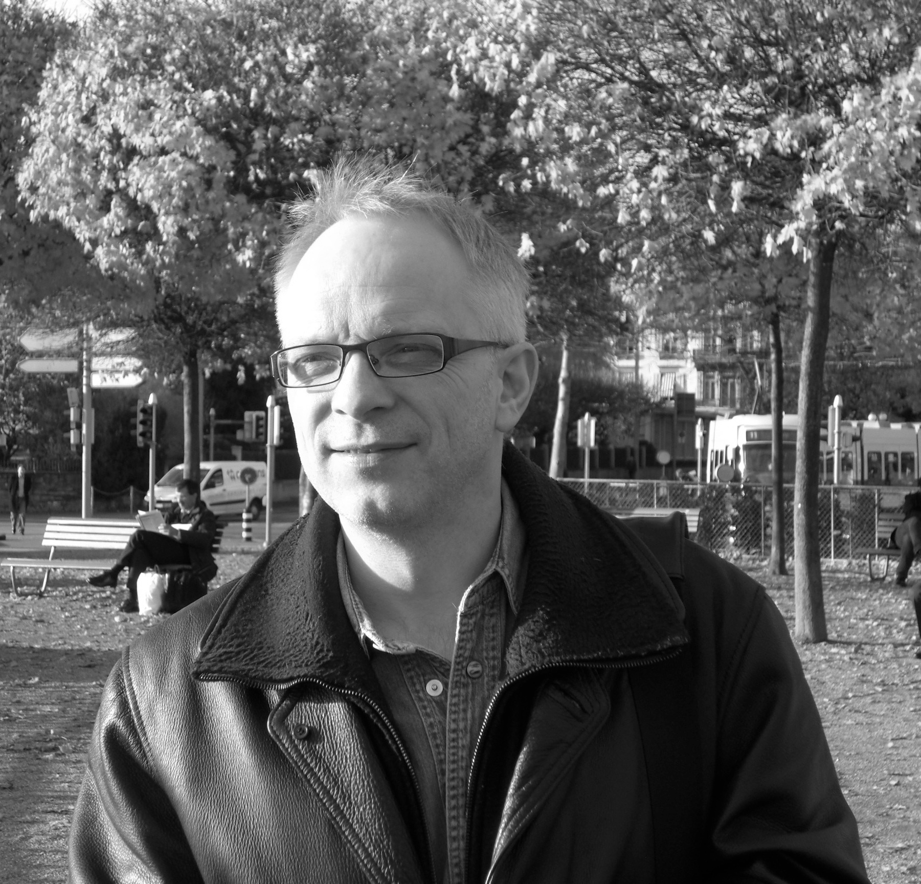 Markus Hediger, novembre 2009«»